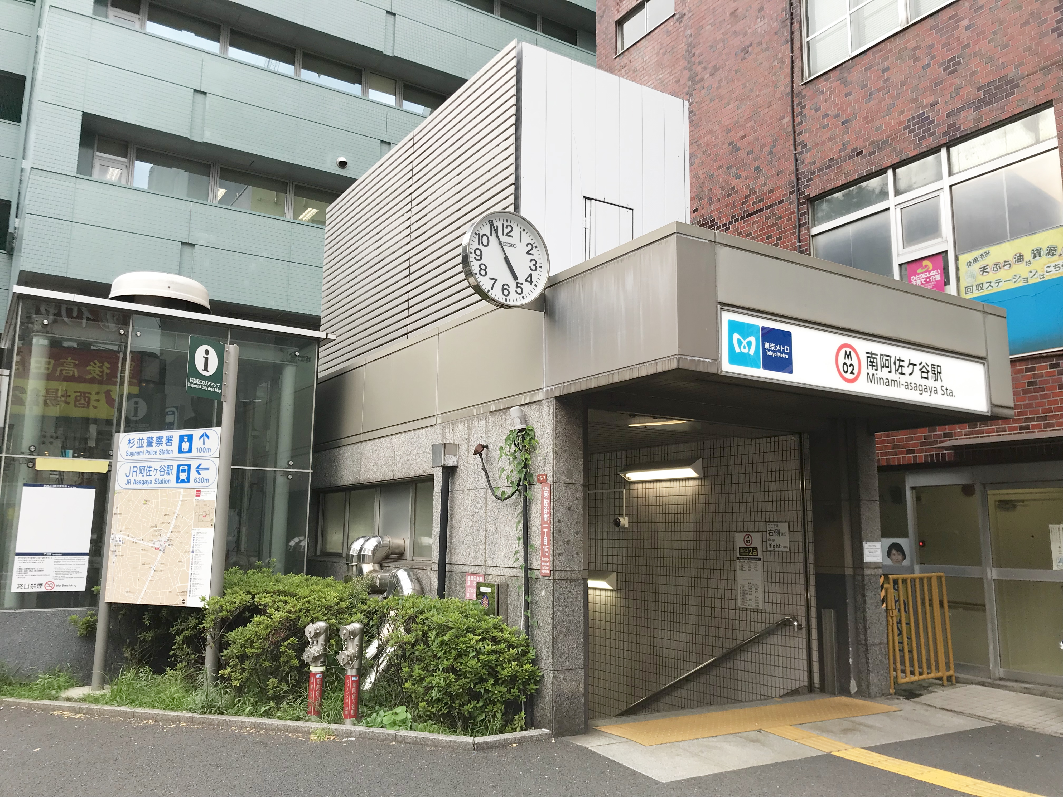 東京メトロ丸ノ内線南阿佐ケ谷駅2a番出入口